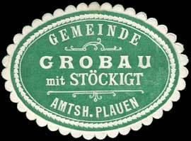 Sealing stamp Title: Gemeinde Grobau mit Stöckigt - Amtshauptmannschaft Plauen Description: grün, weiß, geprägt Place: Grobau / Stöckigt size: 3x4 cm